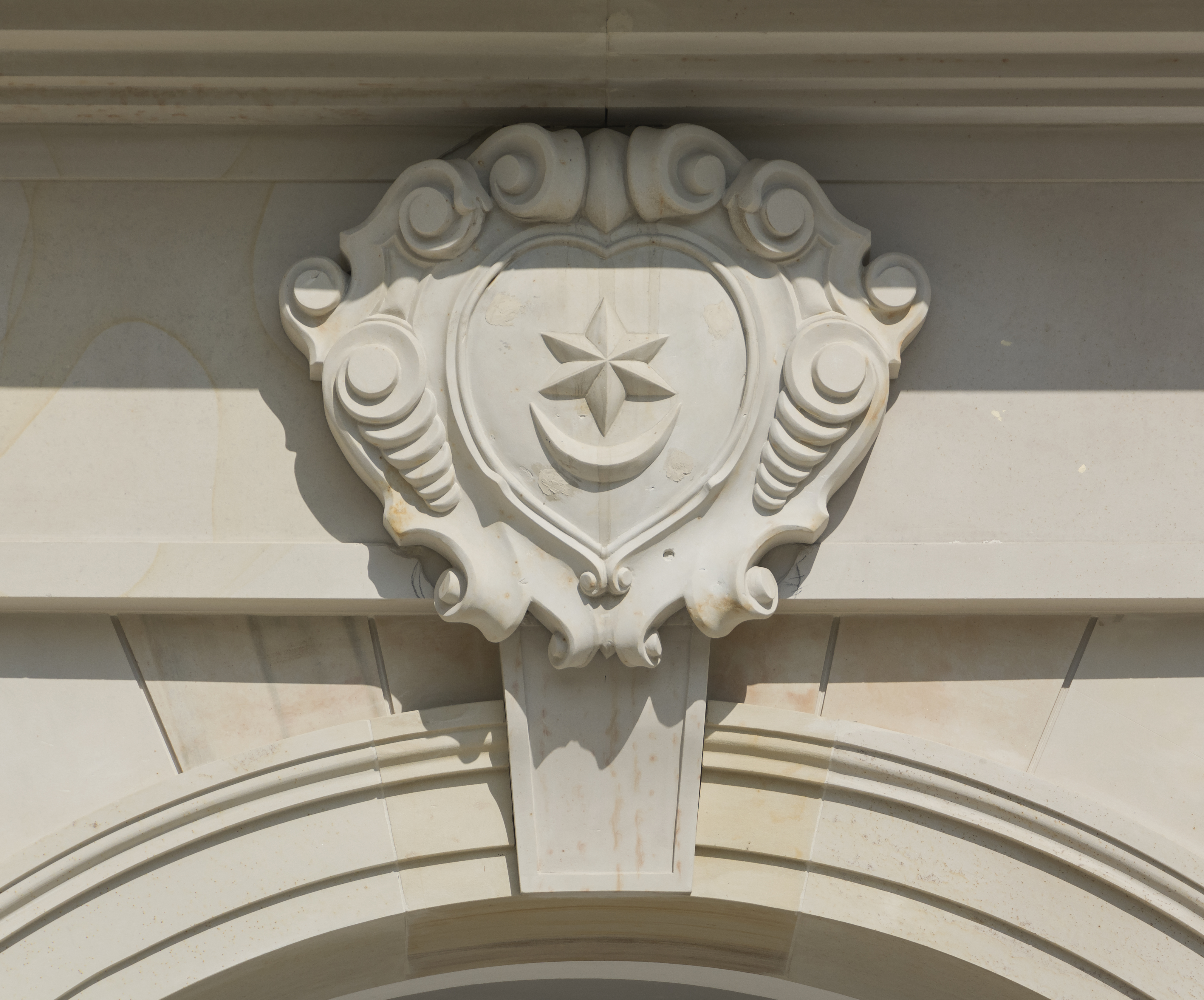 Tarnobrzeg, pałac, XV, XVIII, 1830, 1929